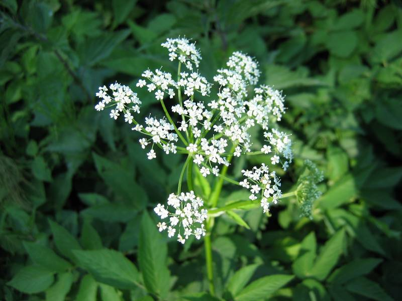 Giersch Aegopodium podagraria